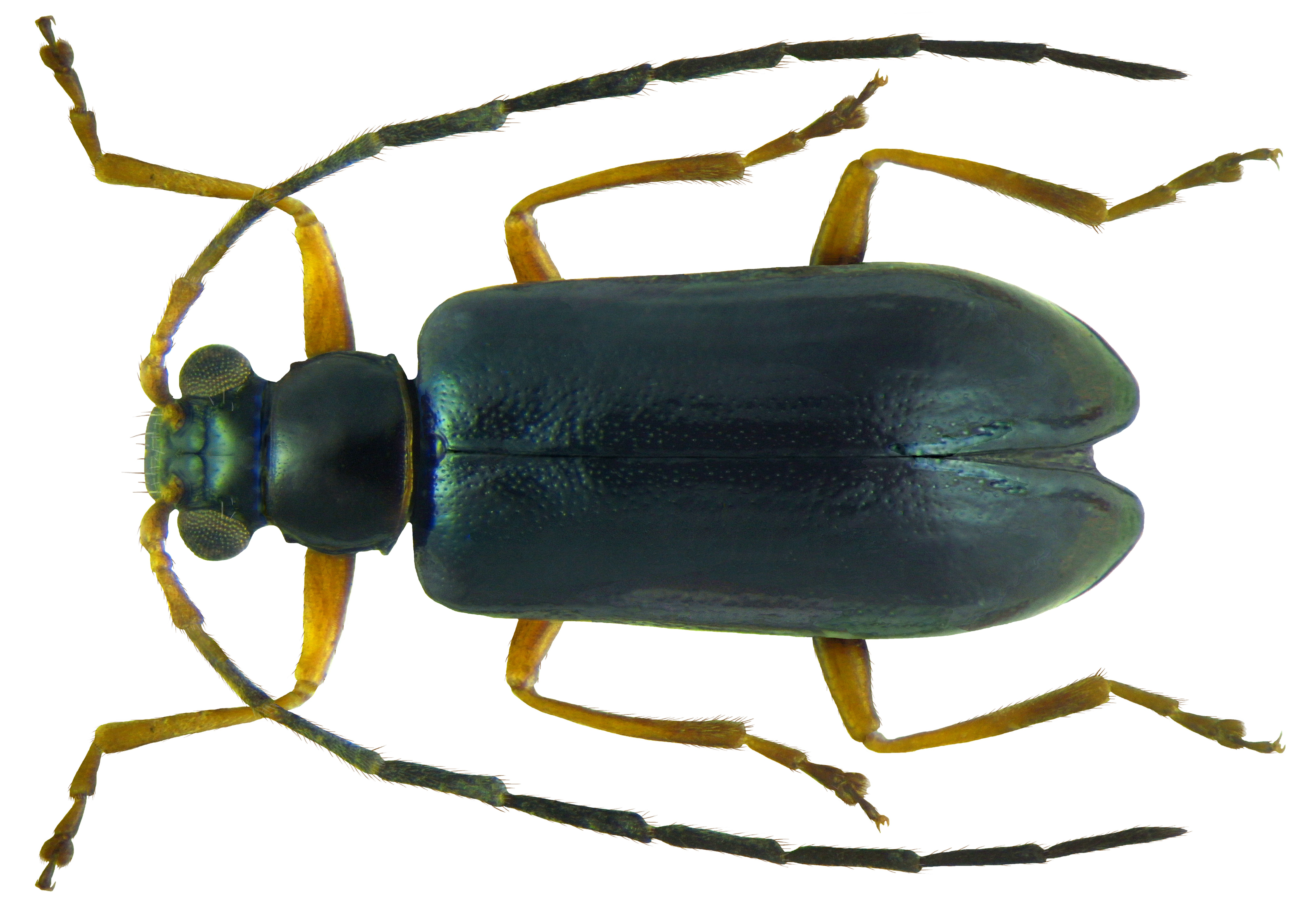 Luperus longicornis (Fabricius, 1781) male Familie: Chrysomelidae Groesse: 4-5 mm Verbreitung: Nord- bis Mitteleuropa Oekologie: an Alnus- und Corylus-Arten Fundort: Germania, Oberbayern, Seeshaupt, Osterseen leg. det. U.Schmit, 1975 Photo: U.Schmidt, 2011